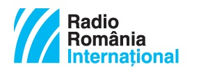 Logo von Radio Rumänien International (RRI)